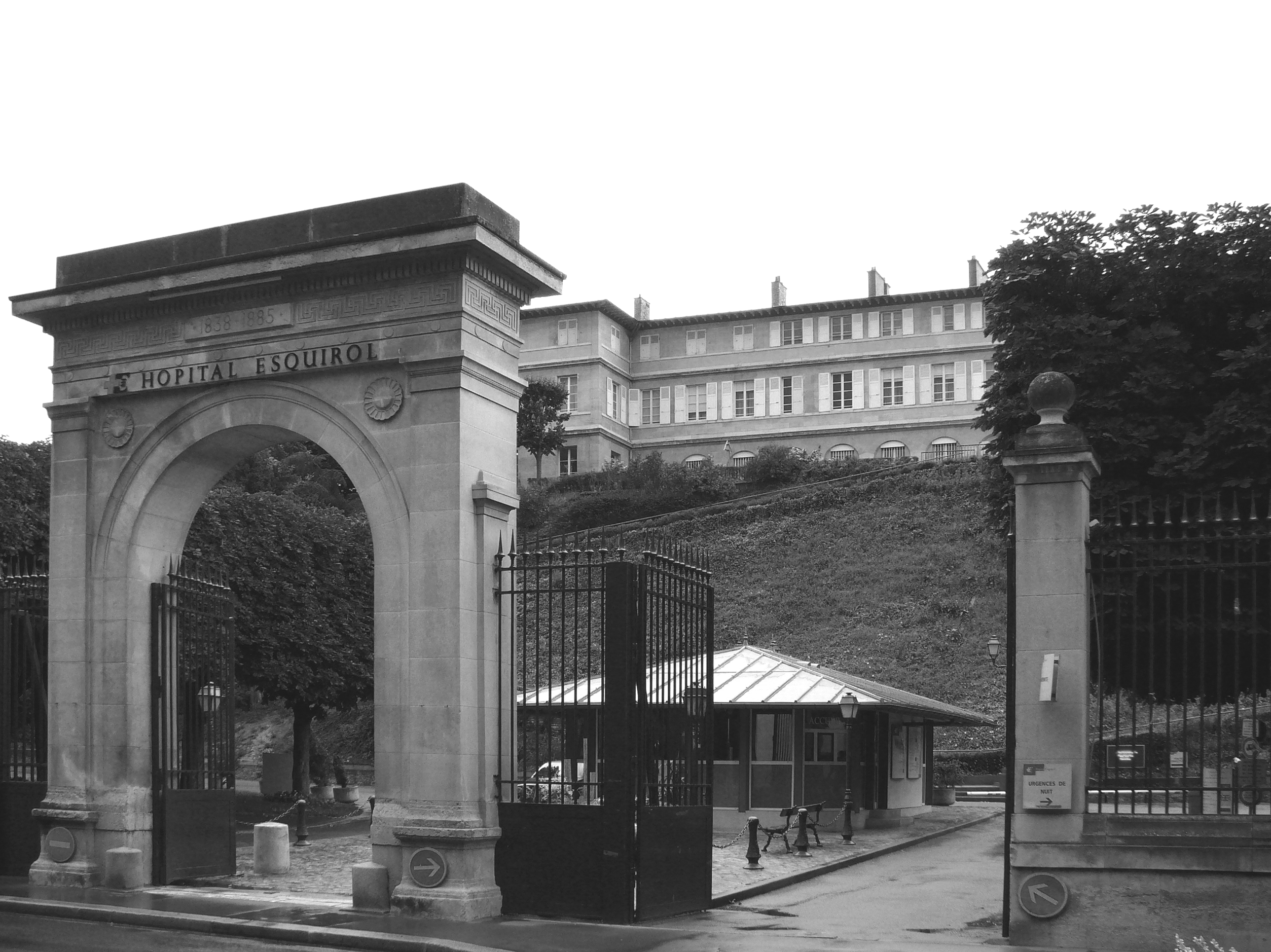 Eingangstor des Hopital Esquirol, Saint-Maurice, Val-de-Marne, Frankreich